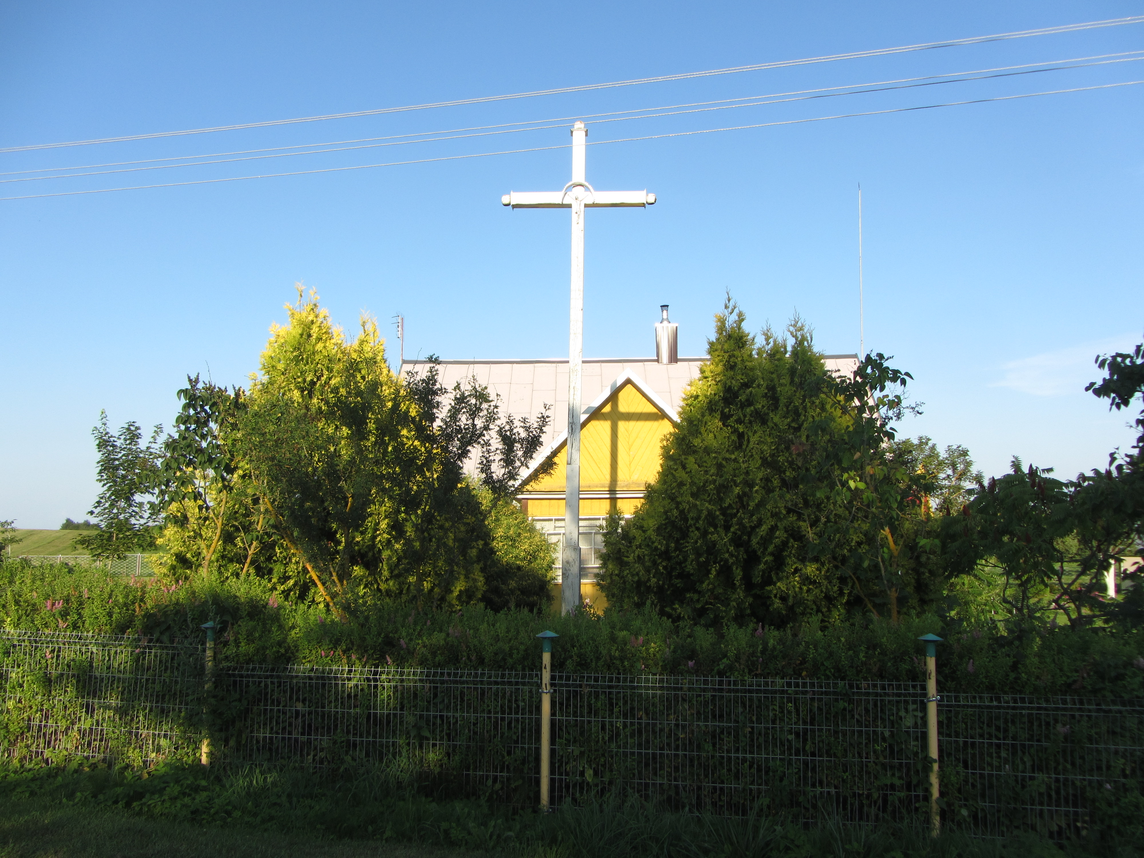 Rubelninkai 30181, Lithuania